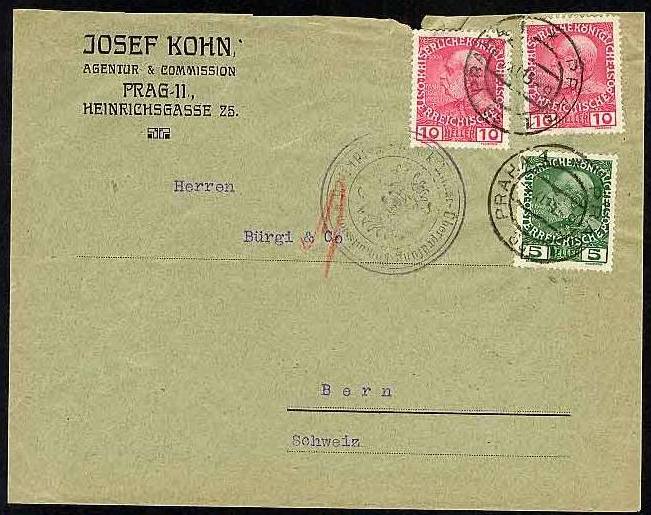 Почтовый конверт отправленный из Праги в Берн в 1915 году, франкированный марками Австрии